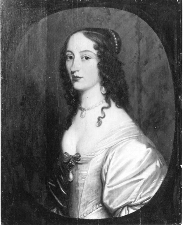 Magdalena von Nassau-Siegen (1623–1647), Gemahlin des Philipp Dietrich (Philipp Theodor) von Waldeck